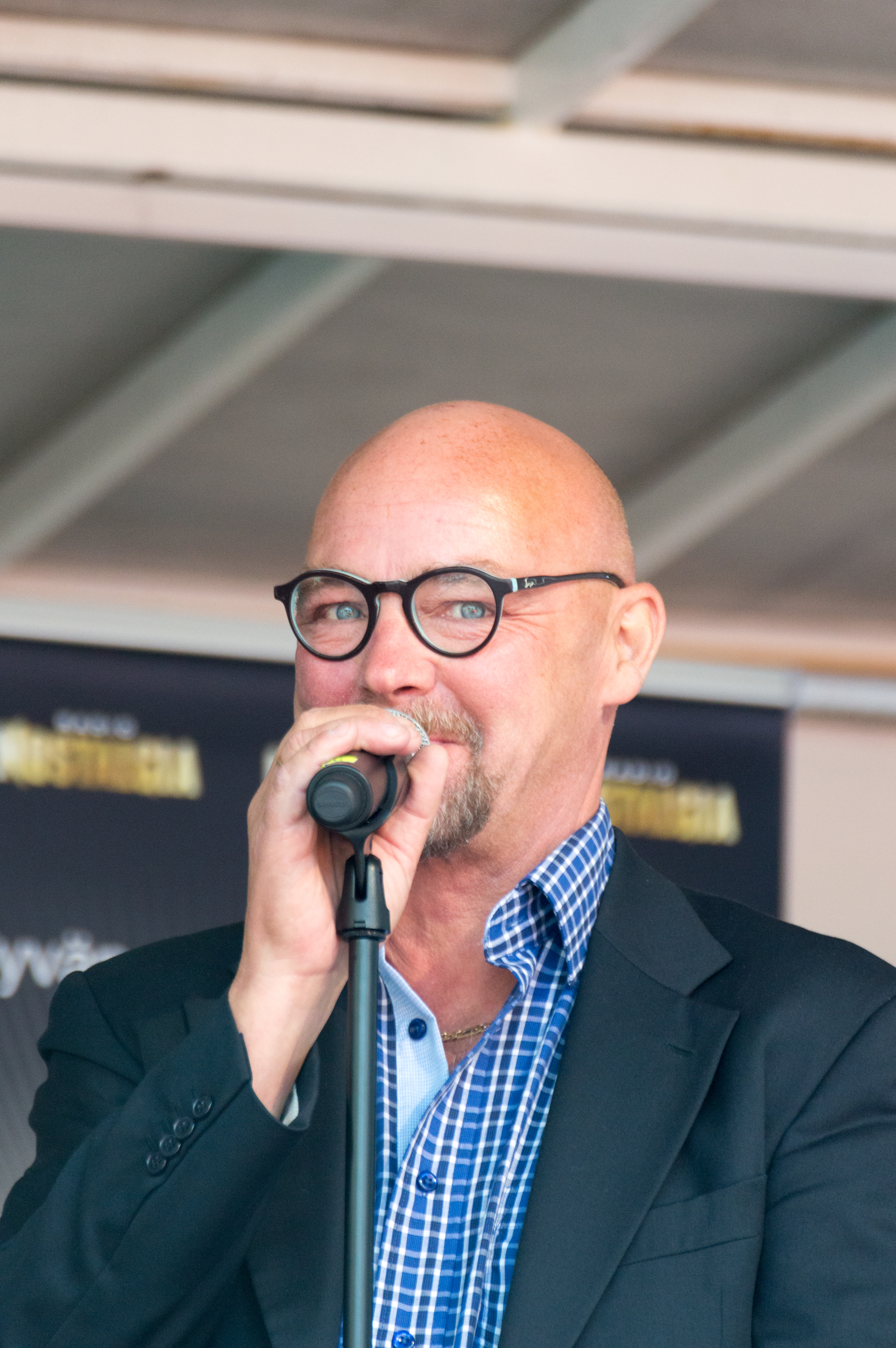 Lasse Norres suomalainen juontaja